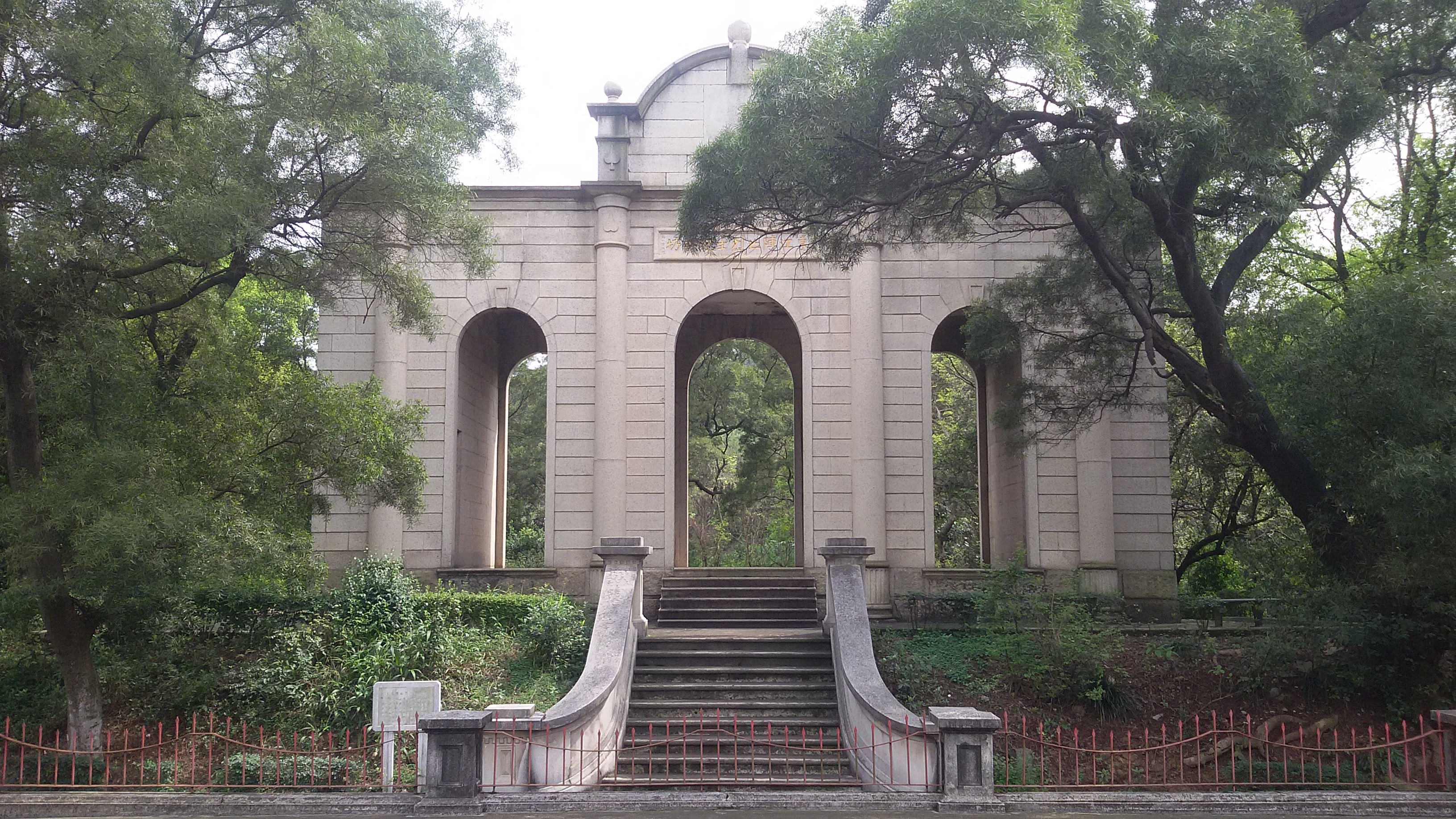 粵語: 東江陣亡烈士記功坊